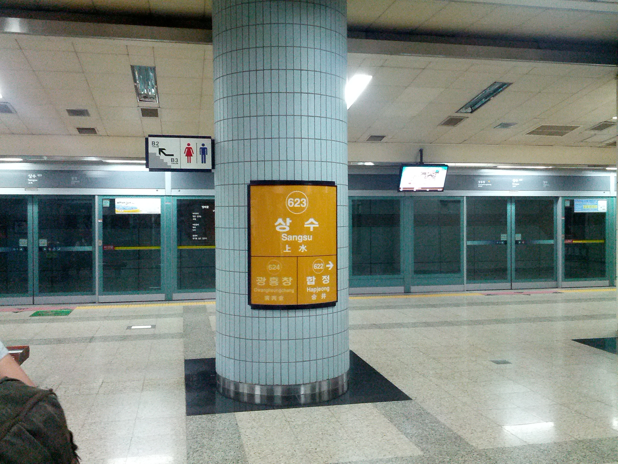 상수역 역명판